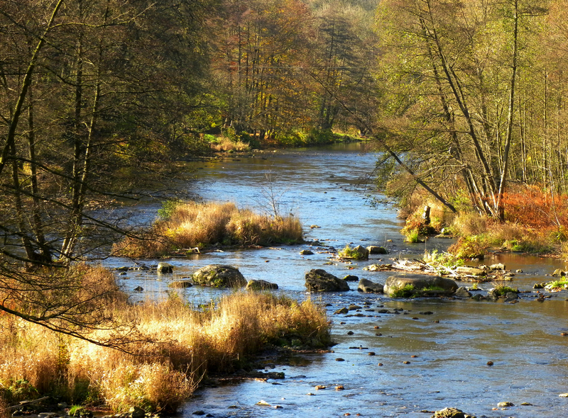 Description L'Amblève à Nonceveux Date10 November 2011SourceLINOTTE AugusteAuthorLINOTTE Auguste L'Amblève à Nonceveux